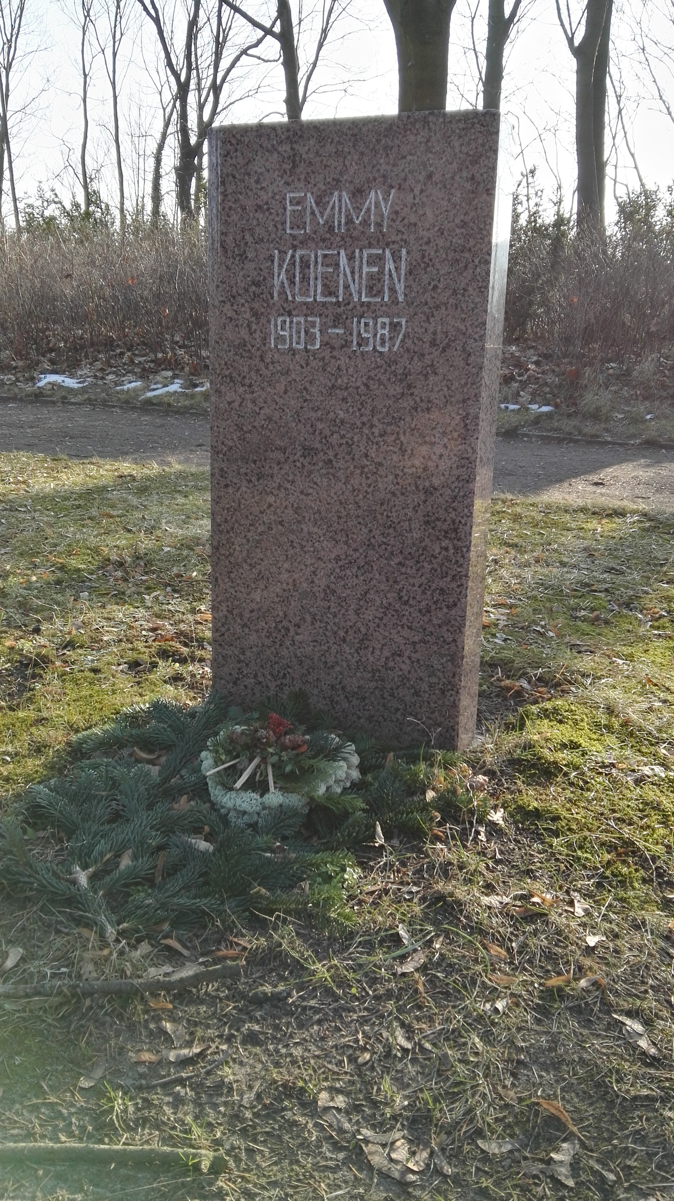 Grab von Emmy Damerius-Koenen in der Grabanlage Pergolenweg auf dem Sozialistenfriedhof des Zentralfriedhofs Friedrichsfelde